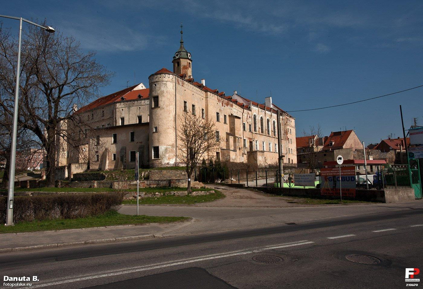 Zachodnia strona zamku. U podnóża jakiś warsztat samochodowy.